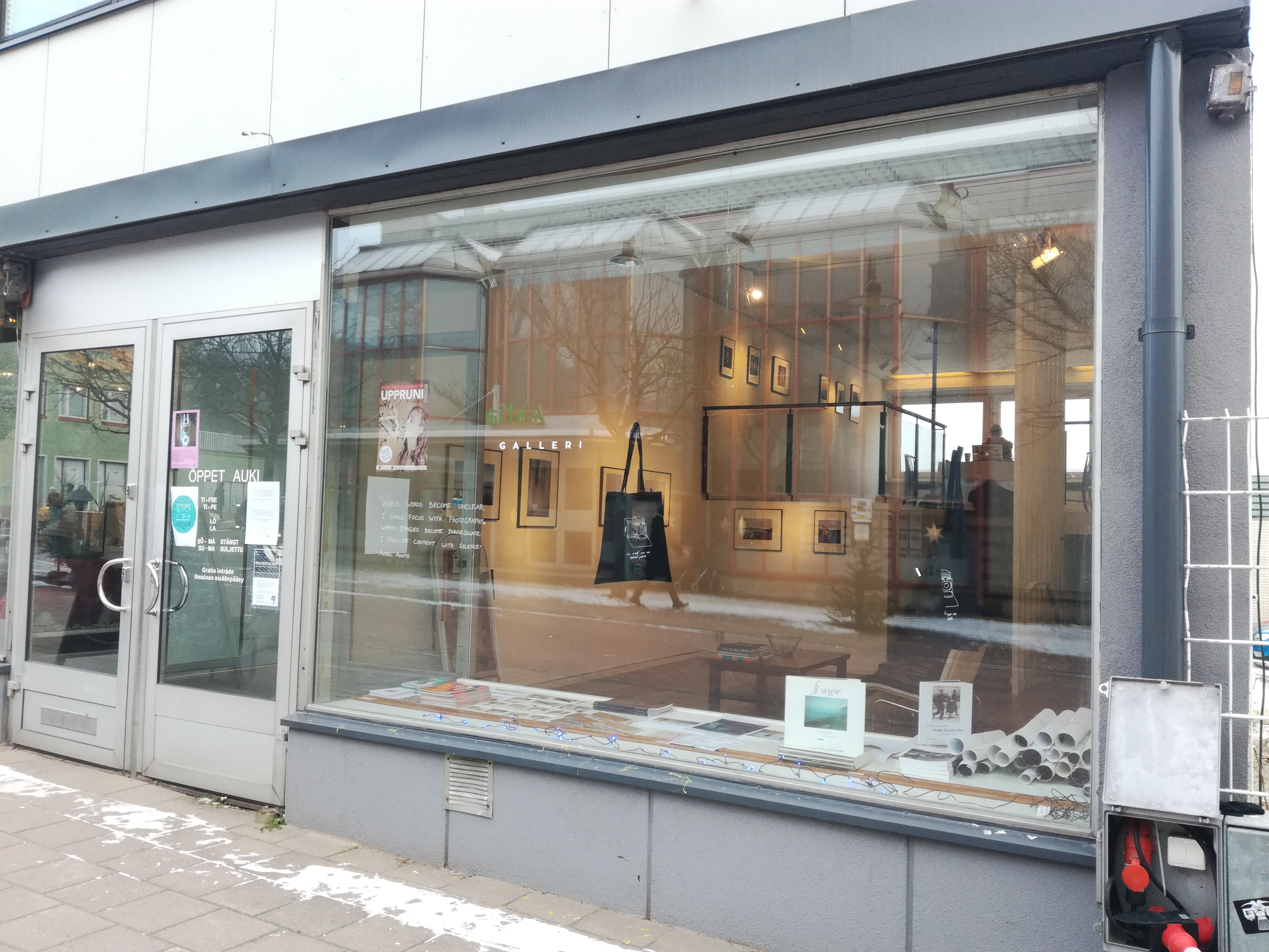 Kauppiaankatu 9, Karjaa, tammikuu 2018